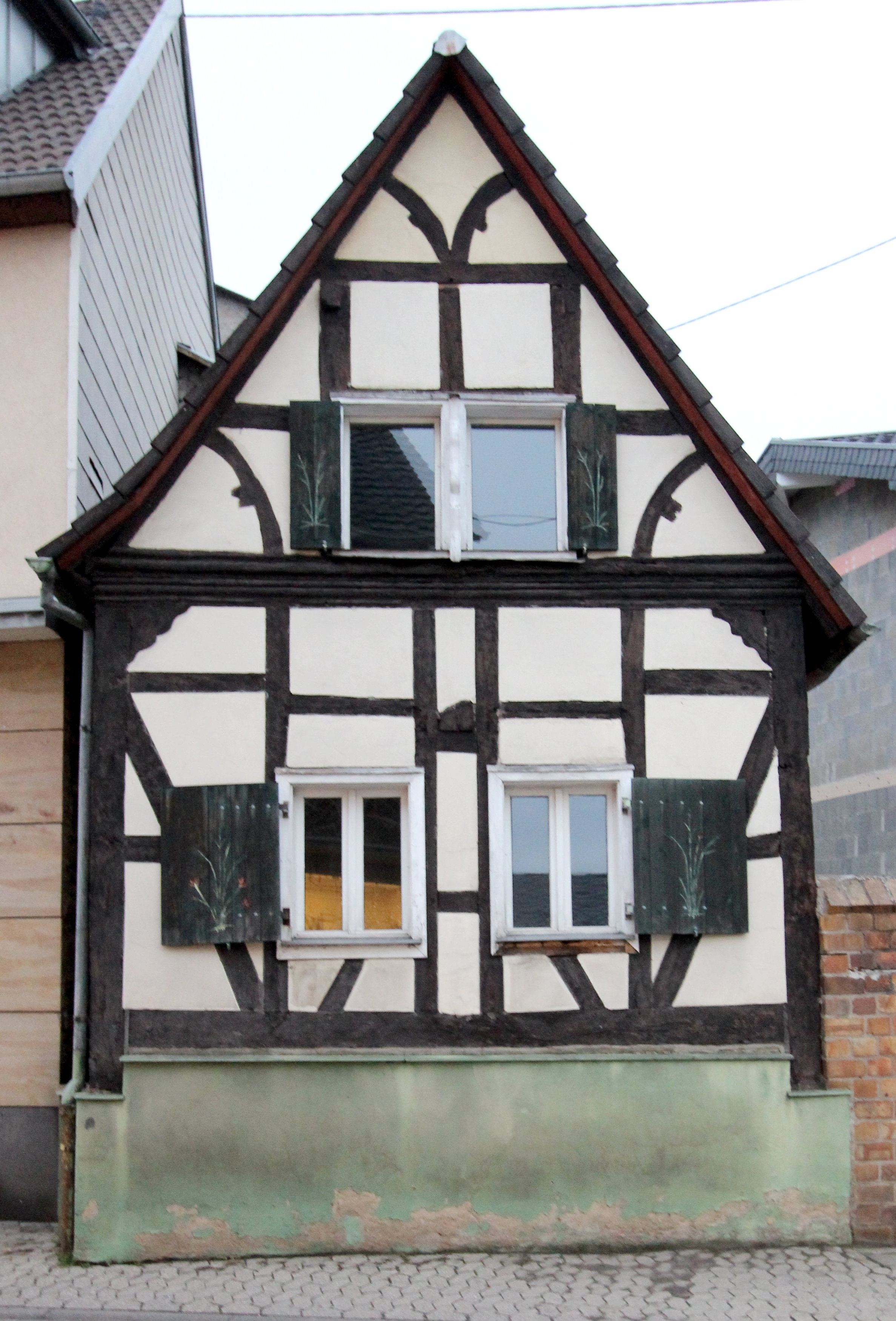 56651 Niederzissen, Brohltalstr. 94. Eingeschossiges Fachwerkhaus und Fachwerkscheune, 18. Jahrhundert; Gesamtanlage. Aufnahme von 2017.